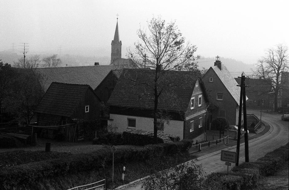 Tschirn/Oberfranken: Blick von oben auf Ortsschild und Kirche